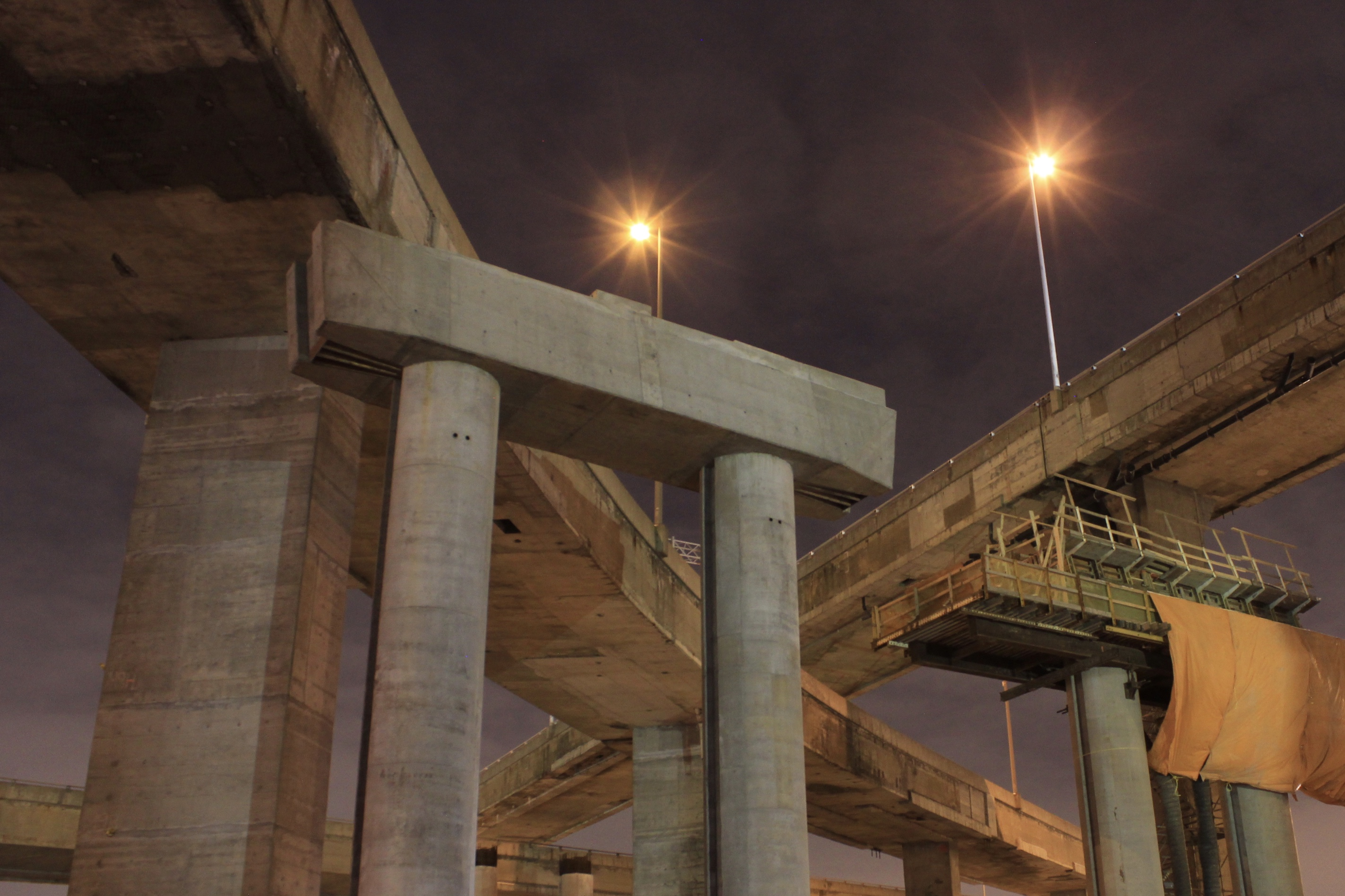 Nouveaux piliers en construction sous les anciens.